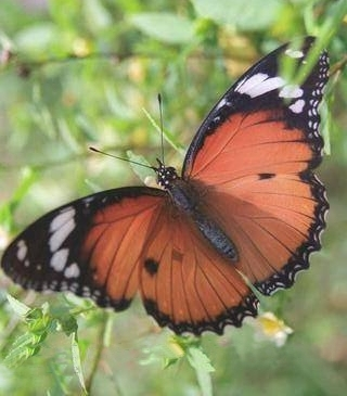 Hypolimnas missipus adult, India